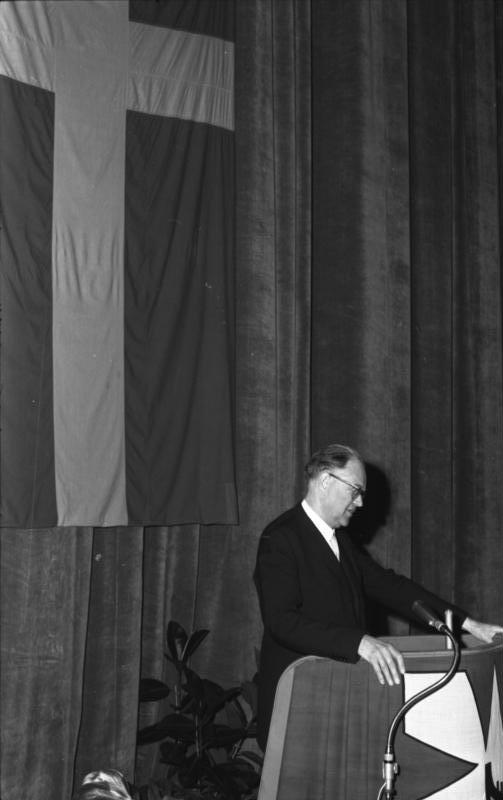 Kieler Woche Empfang im "Kieler Kaufmann" u. Vortrag des schwed. Ministerpräs. Tage Erlander